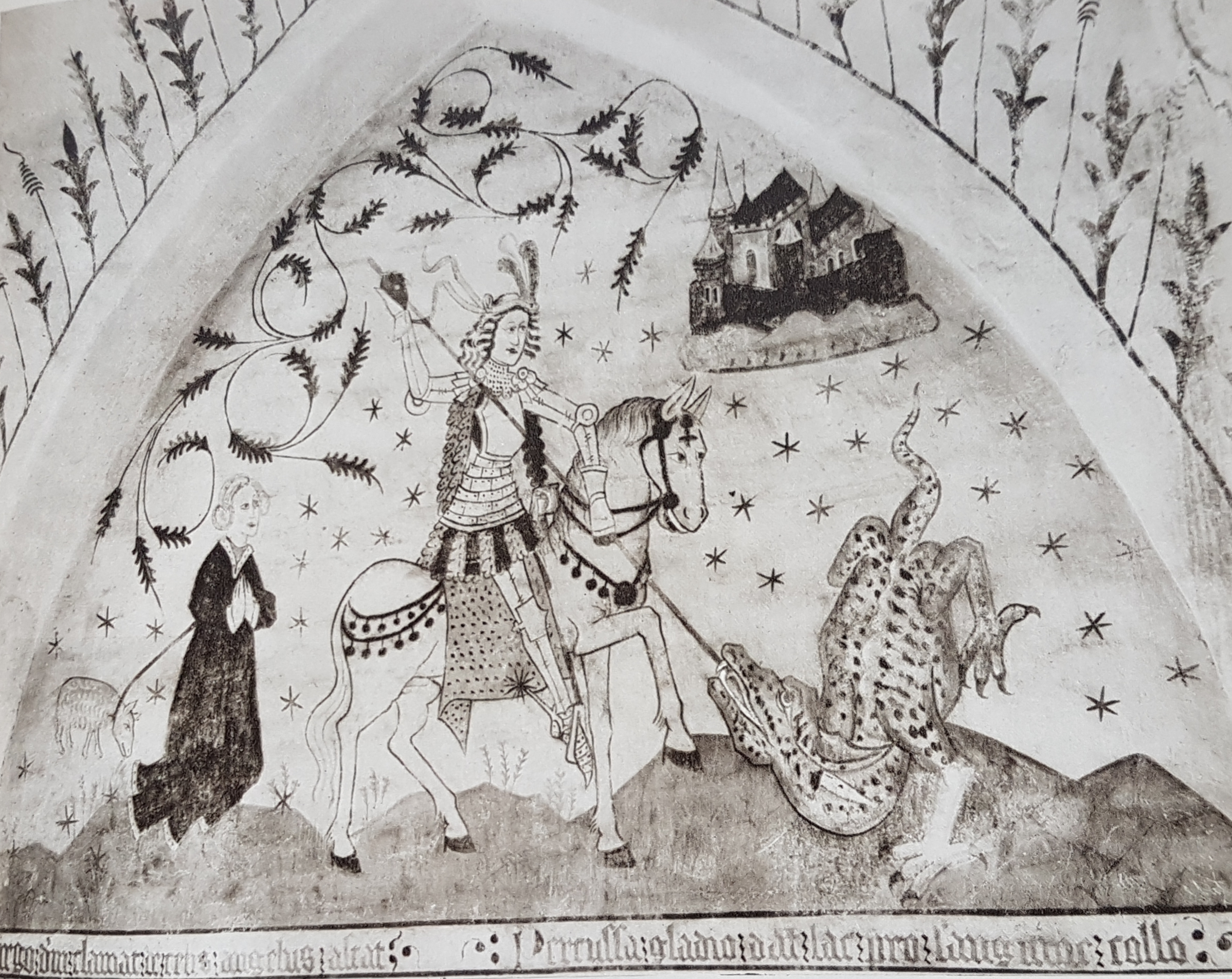 Valvmålningen St Göran strider mot draken i Vendels kyrka utförd av Johannes Iwan